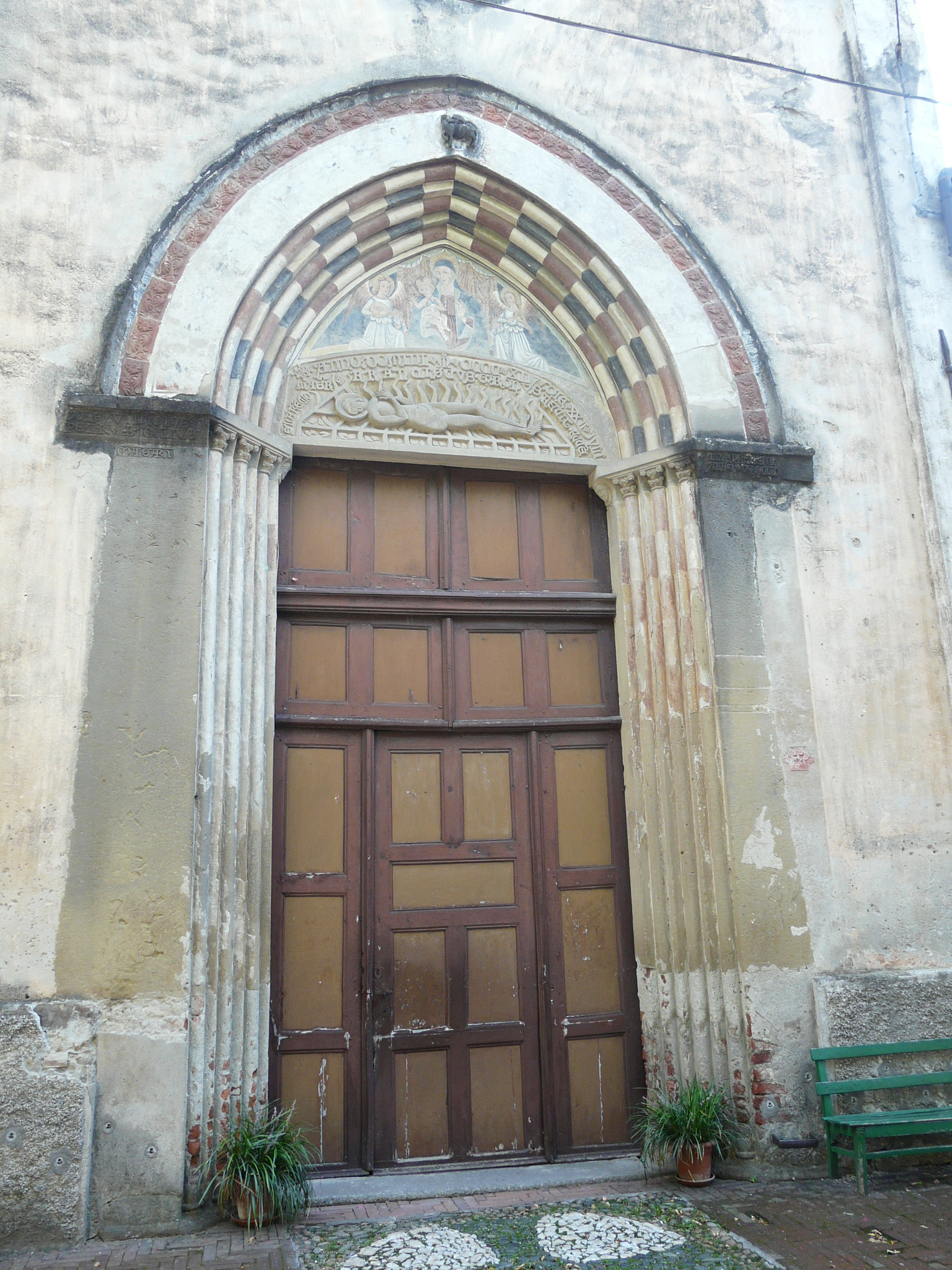 Chiesa di San Lorenzo, Murialdo, Liguria, Italia